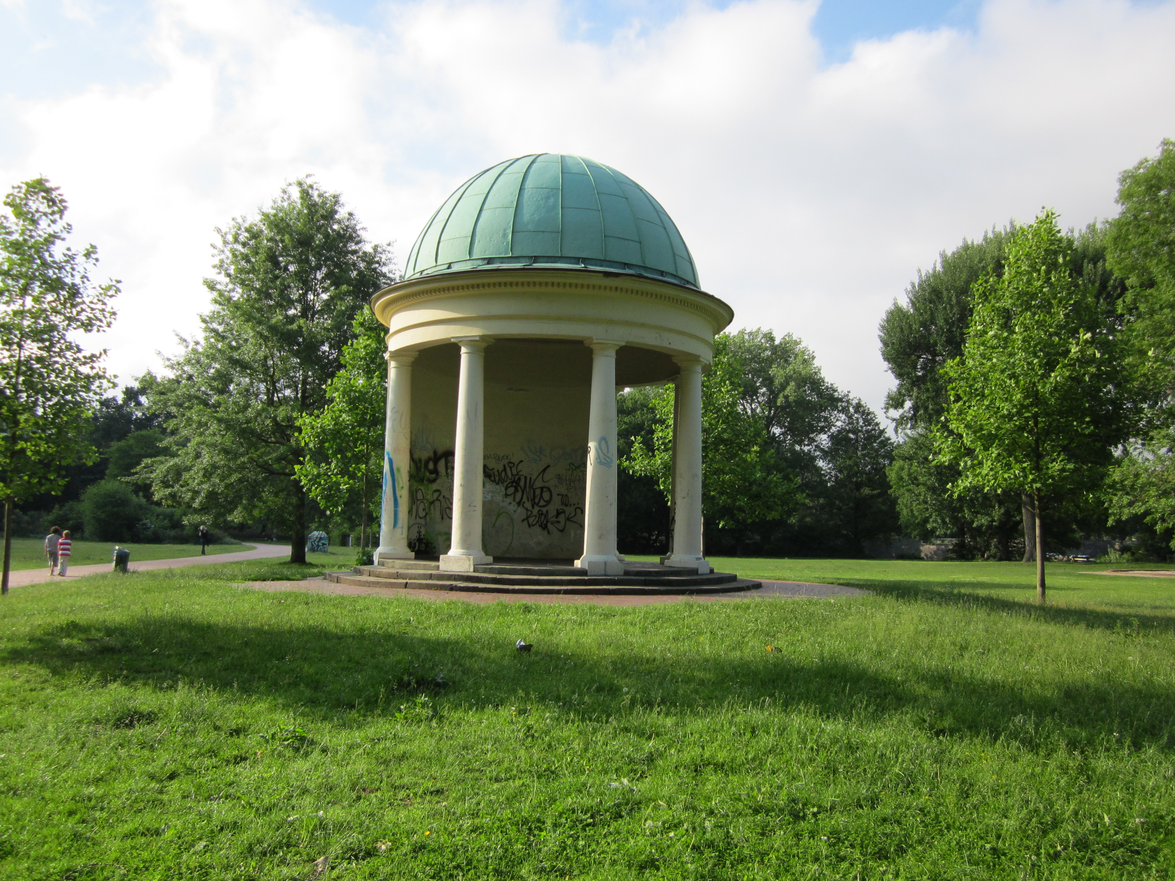 Den Monopteros in Hayns Park in Hamburg-Eppendorf ließ der Hamburger Senator Max Theodor Hayn, der hier seinen Landsitz hatte, erbauen.